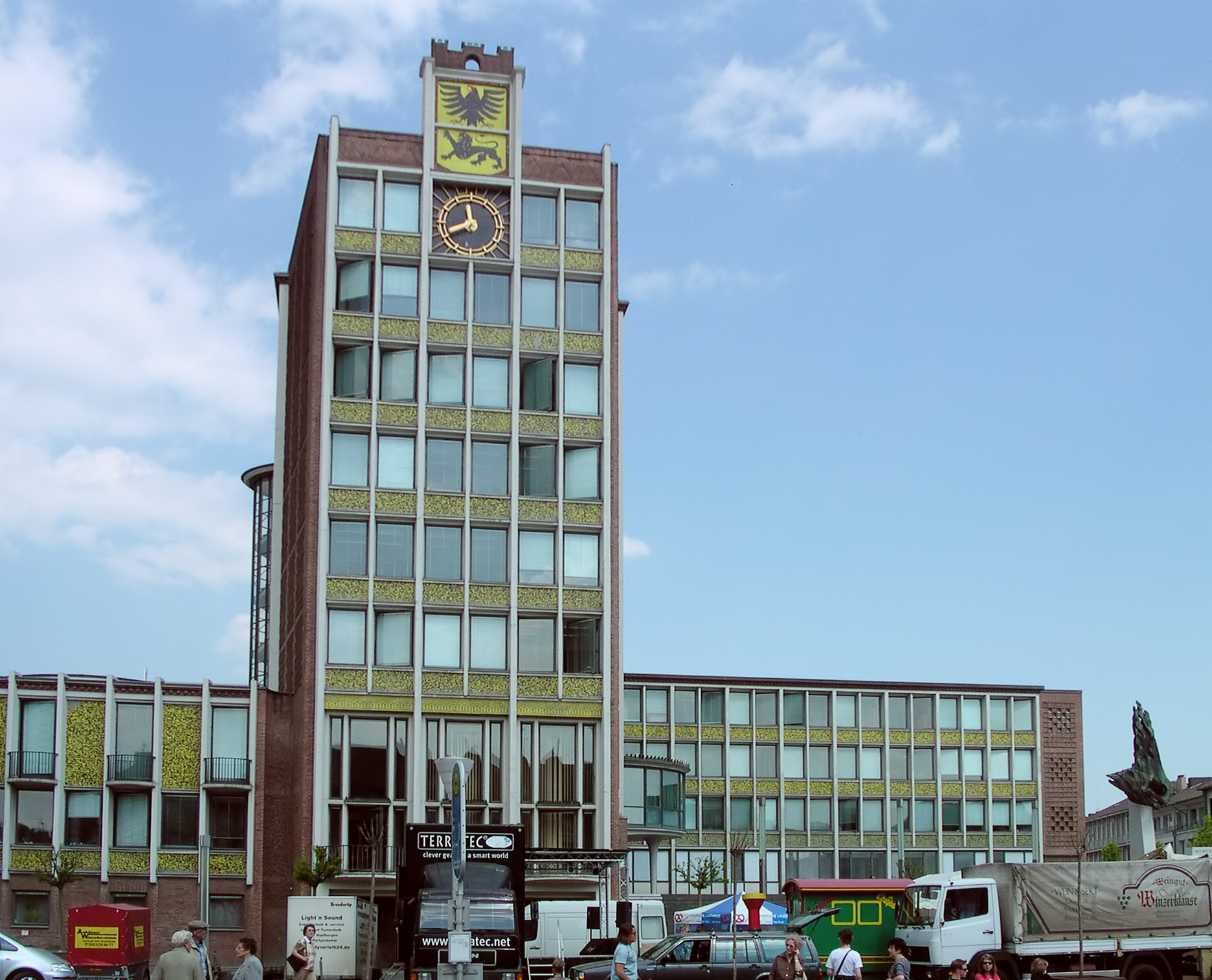 Düren, Rathaus, Architekt: Denis Boniver (1955)